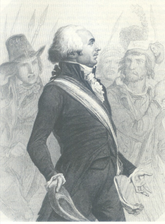 Der französische Revolutionär und Politiker Jérôme Pétion de Villeneuve (1756-1794)